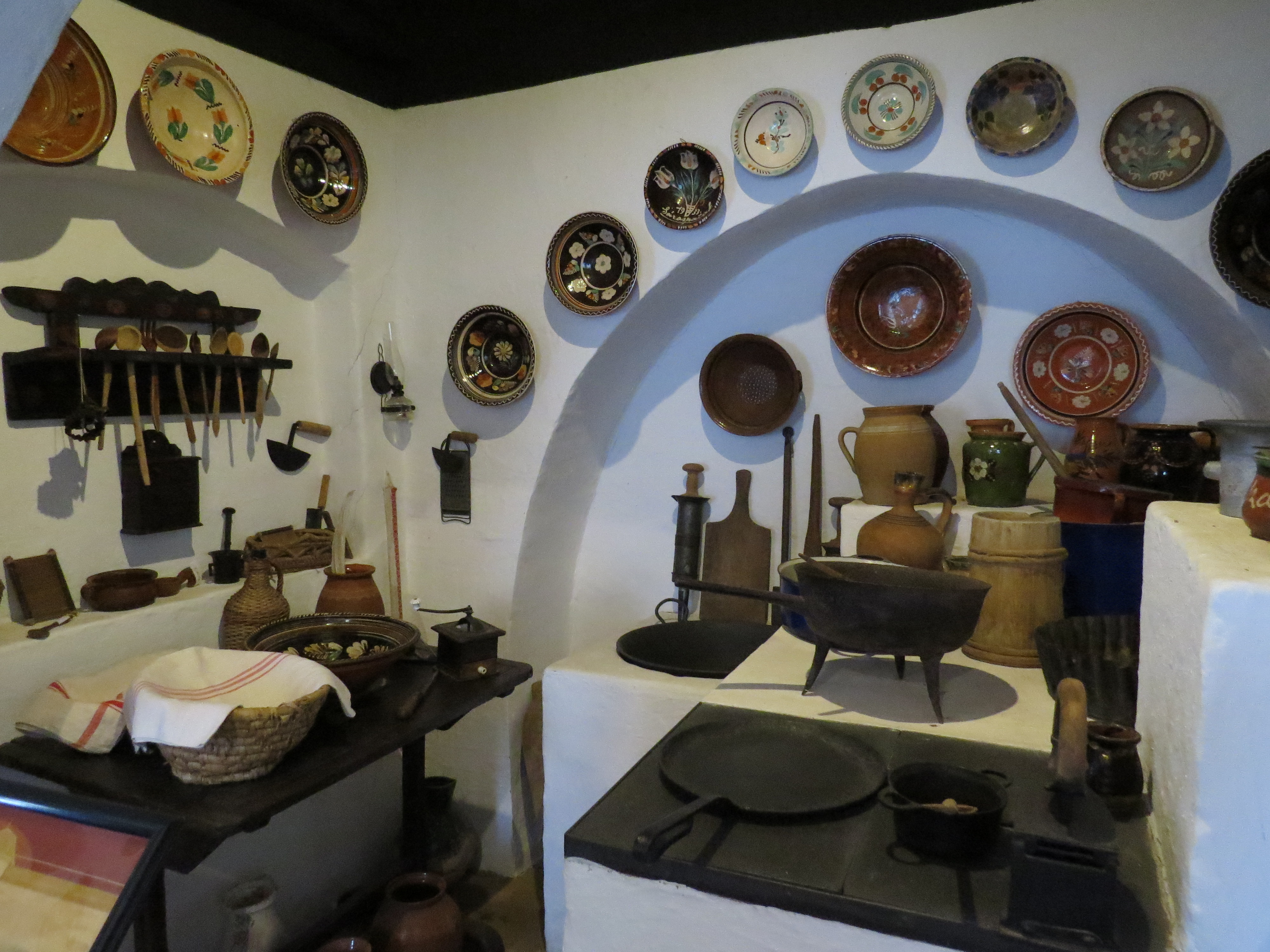 A Bodrogközi Múzeumporta "alapító" tájházának belső (pitvar) részlete.(Cigánd)